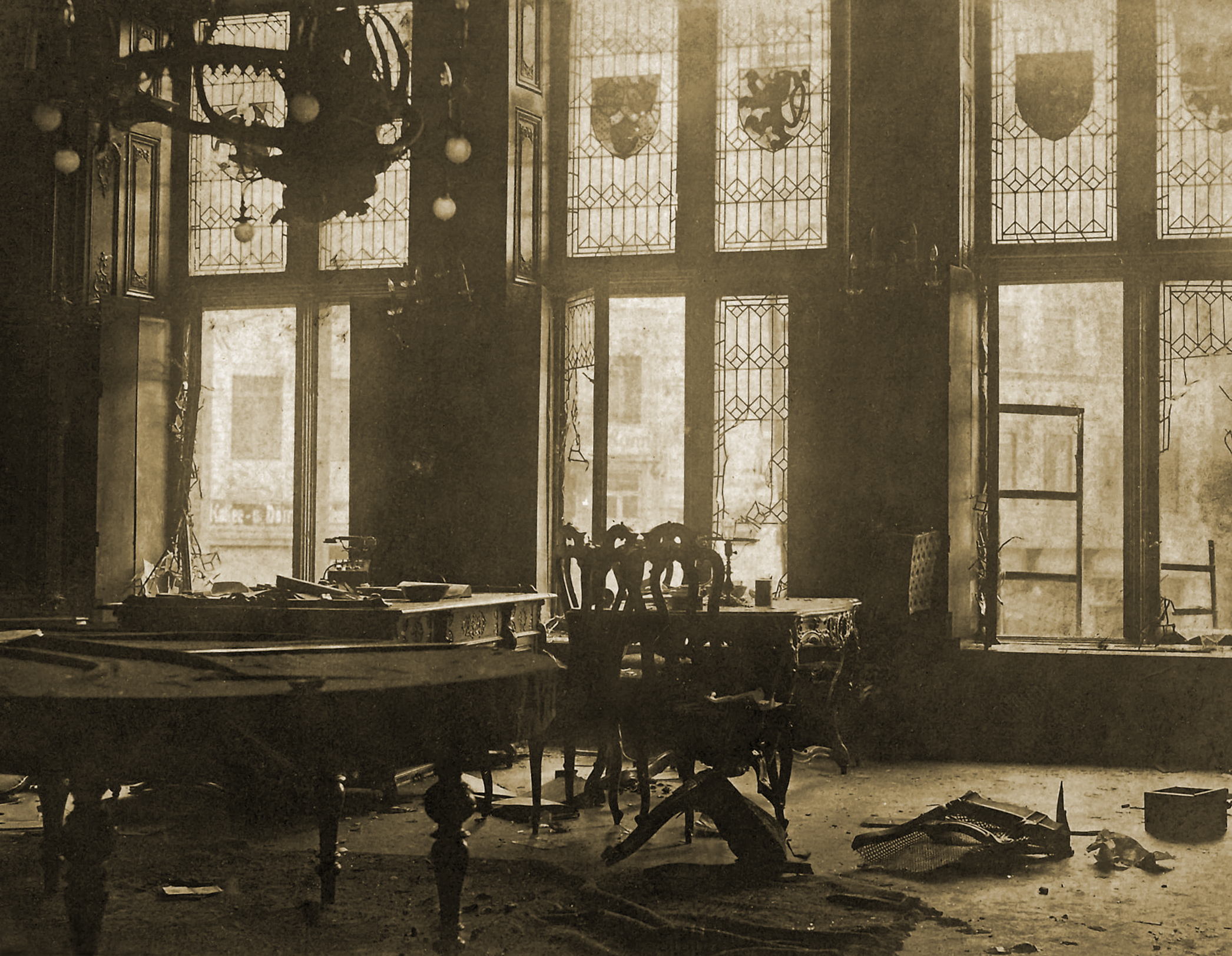 Verwüstungen im Aachener Rathaus nach dem Sturm der Sonderbündler am 21.Oktober 1923